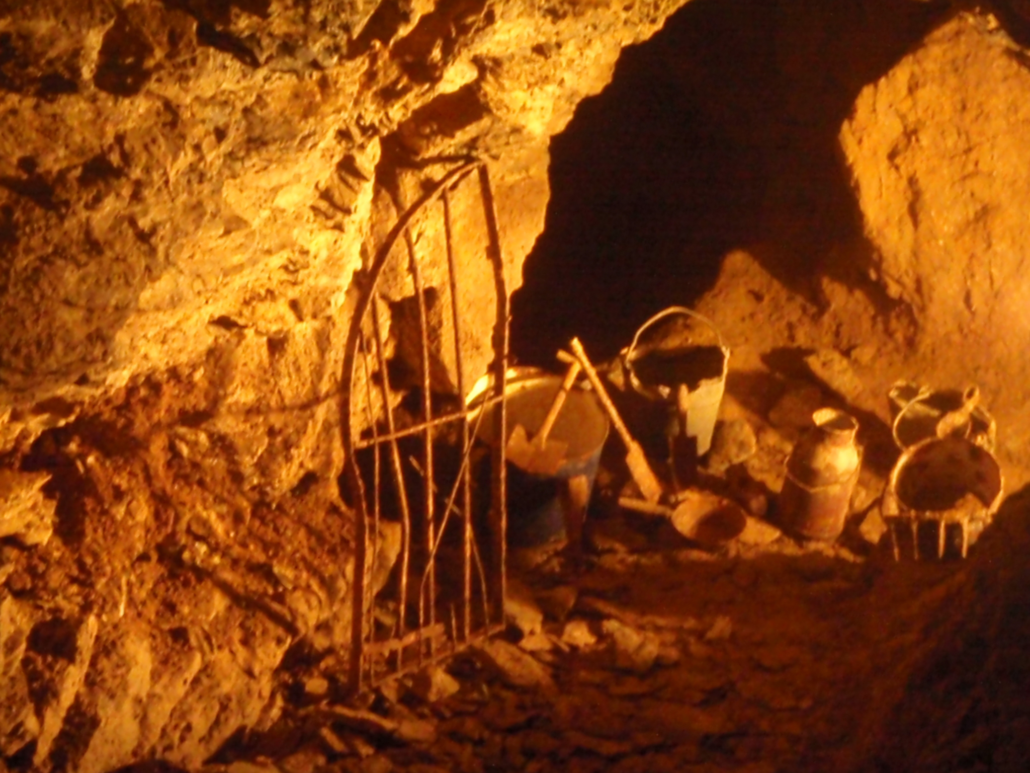 Zpřístupňovací práce